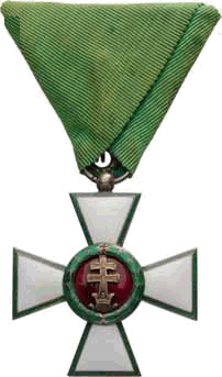 Magyar Érdemrend lovagkeresztje 1922-ből